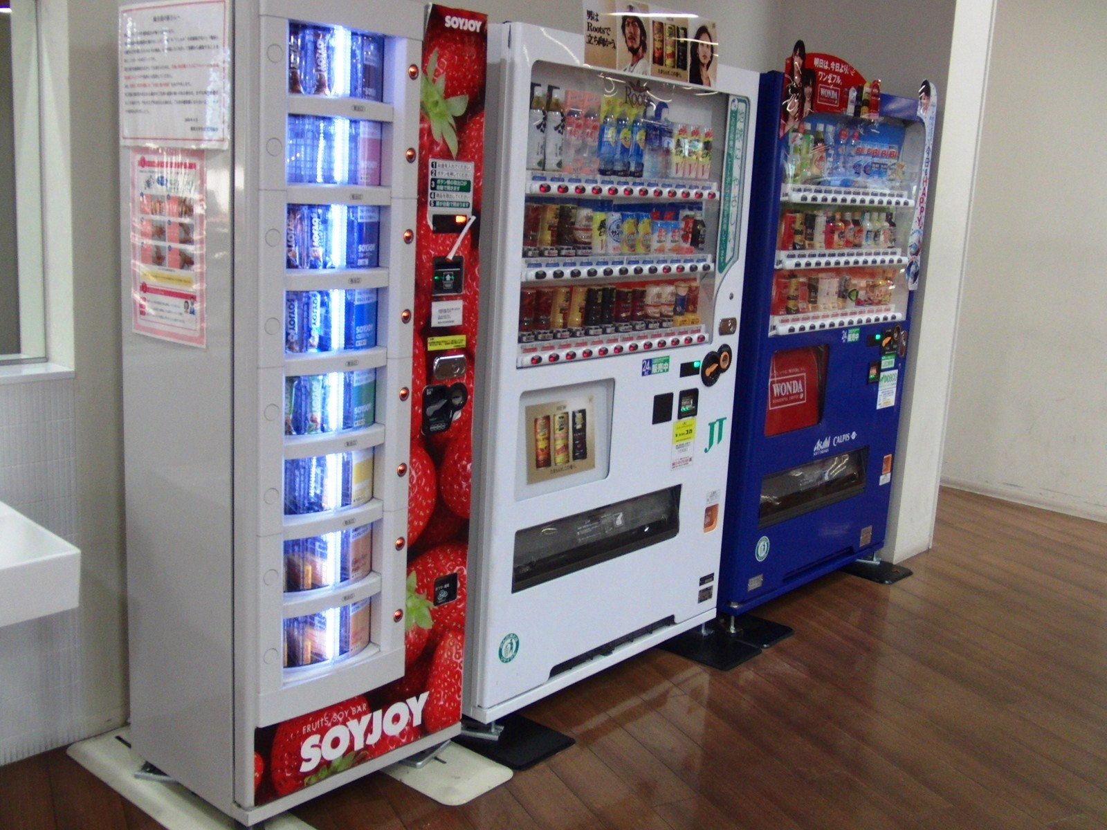 関西大学凛風館食堂にある自販機を撮影